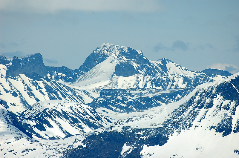 Galdhøpiggen (image center) seen from Fannaråki. Taken with Nikon D70s